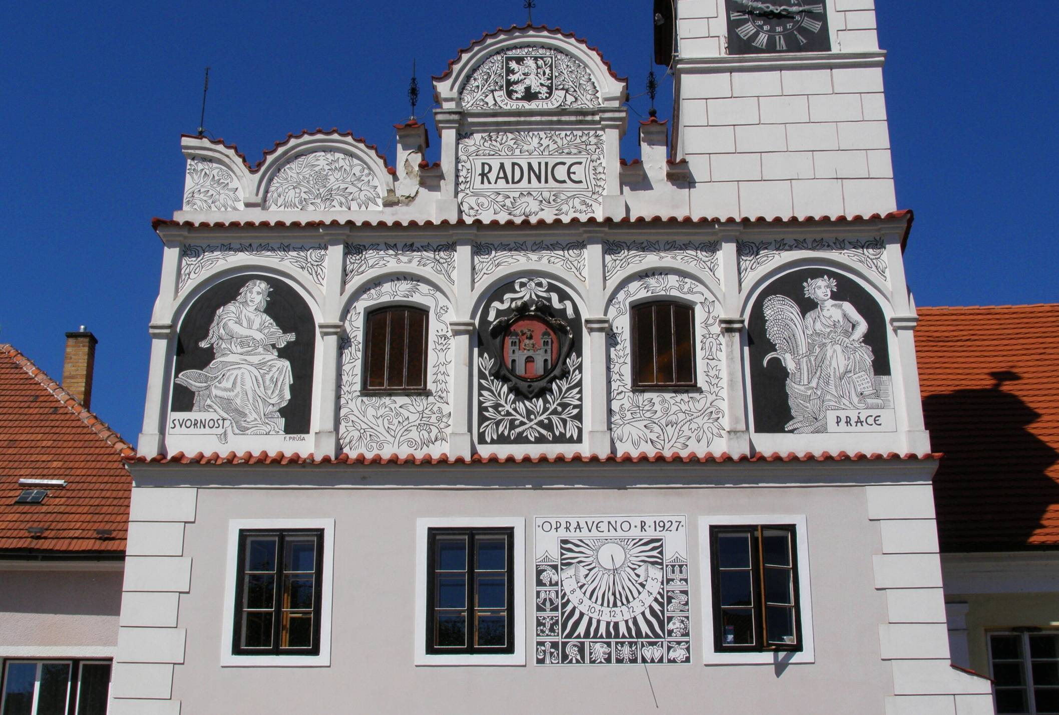 VOLYNĚ-radnice/rathaus